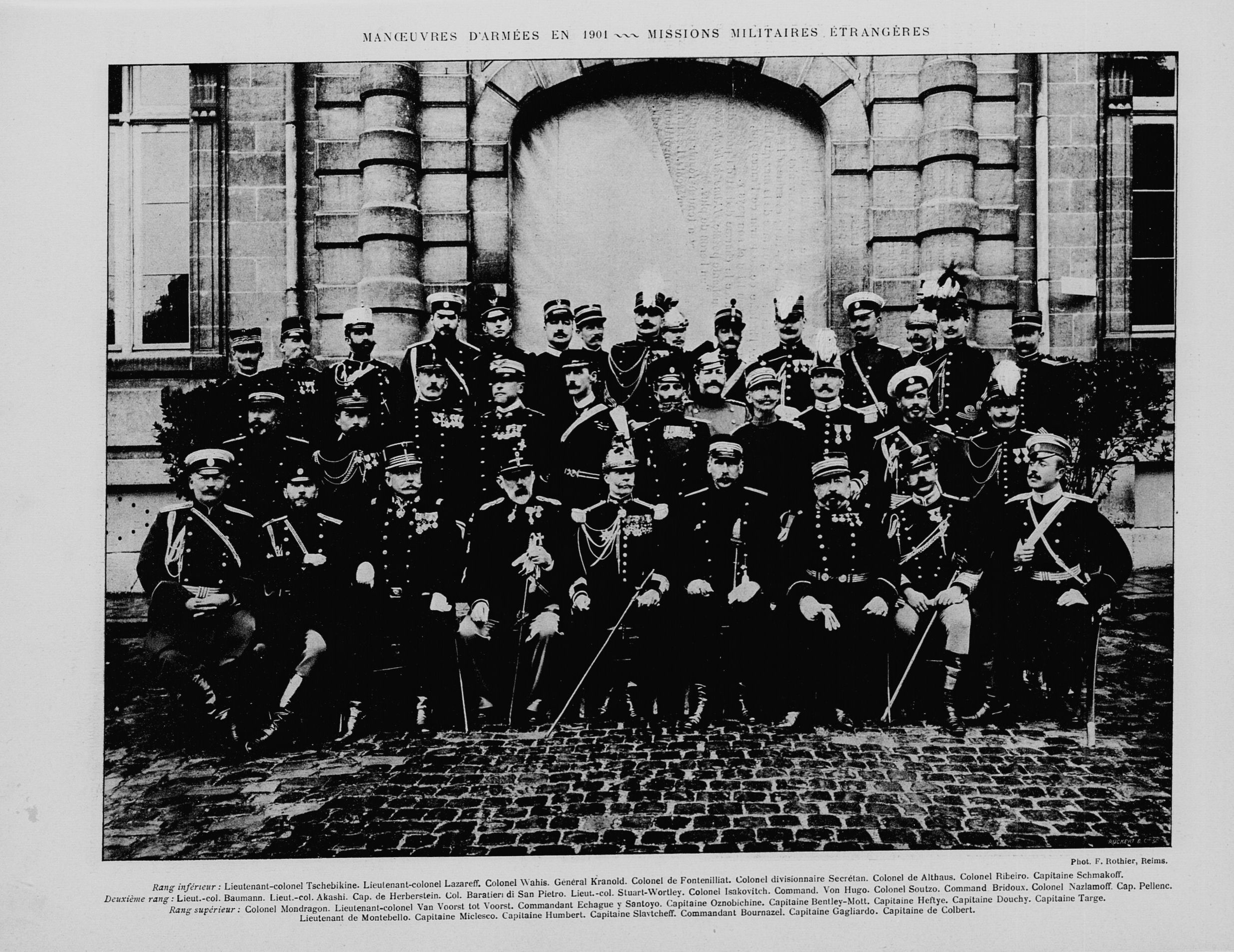 Grandes manœuvres de l'Est de 1901,délégations militaires étrangéres